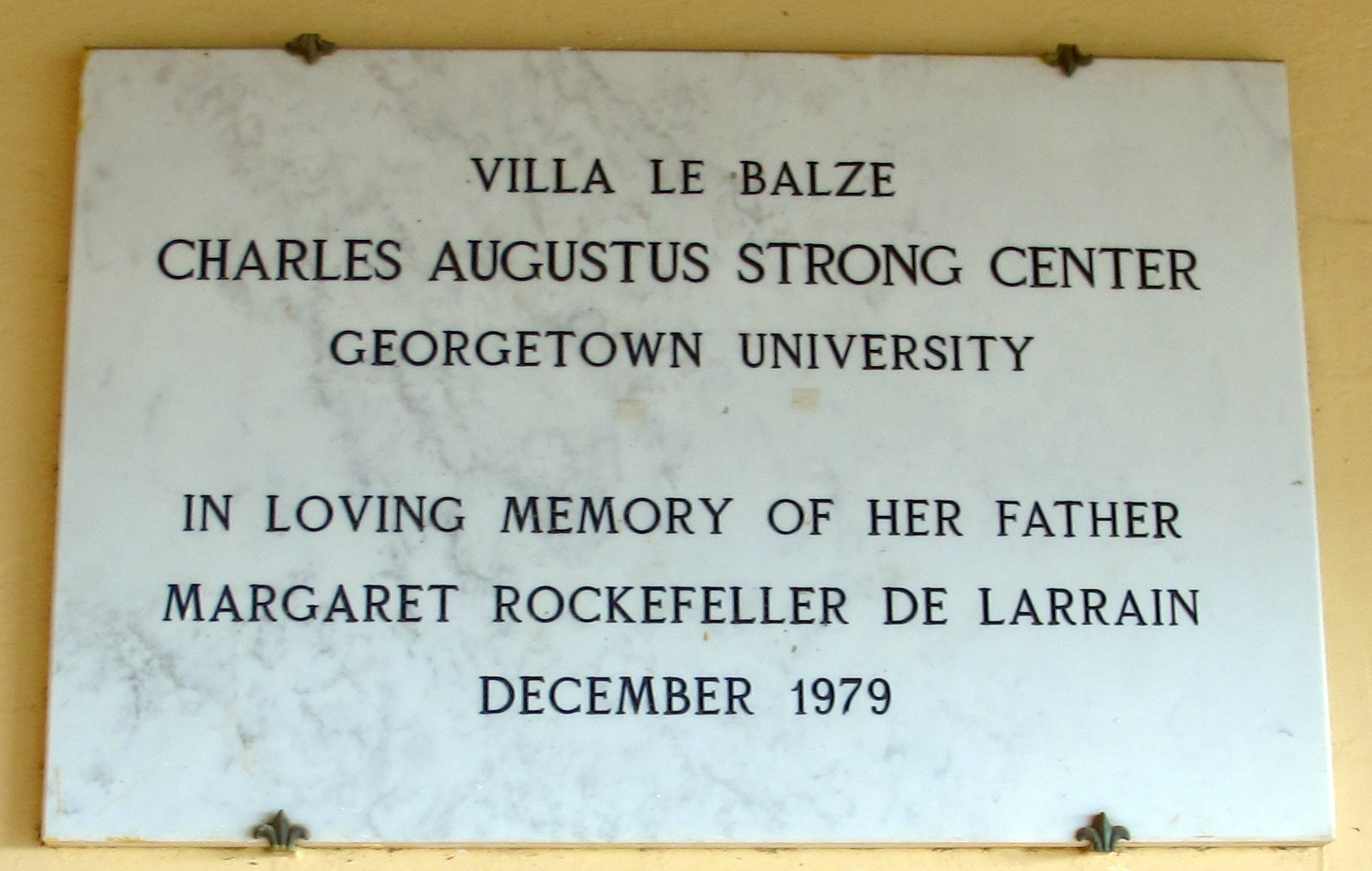 Villa le balze, terrazza, targa georgetown university